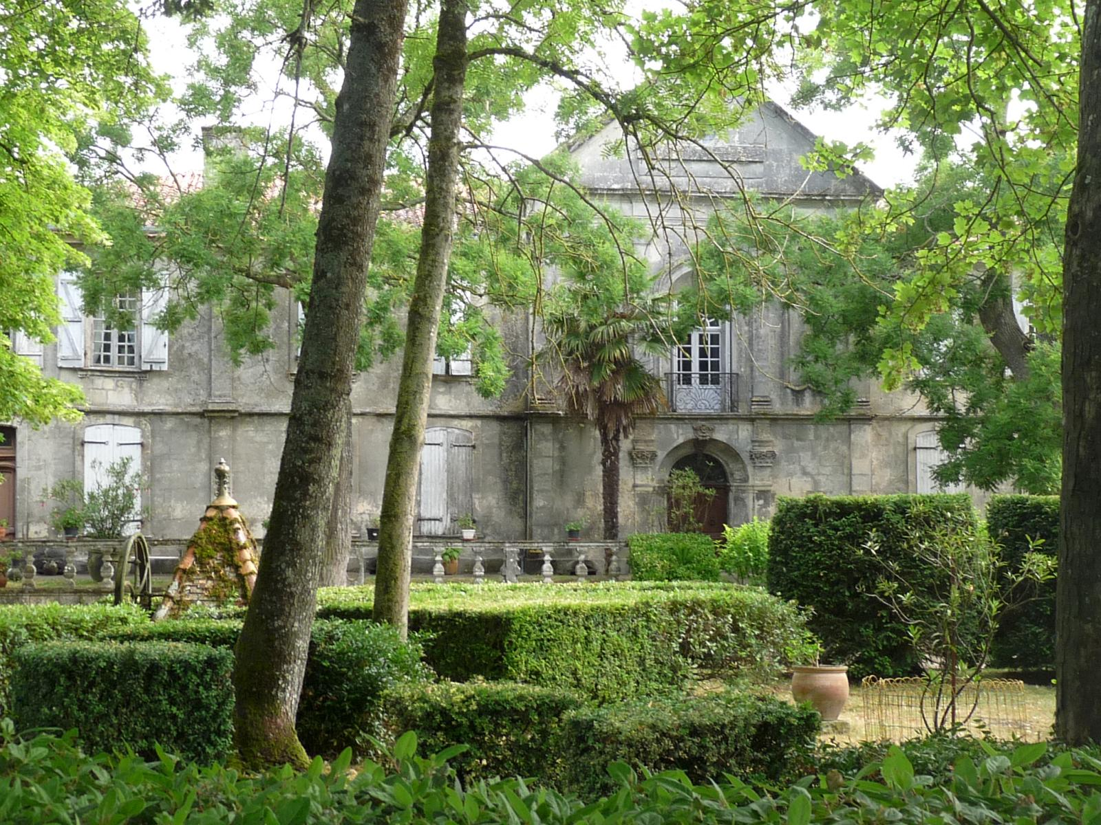 Château de Beauregard, Juillac-le-Coq, Charente, France; cour intérieure et jardin